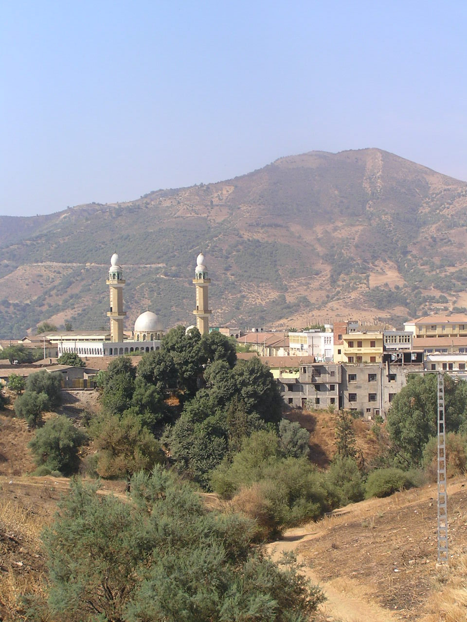 Minarets, Lakhdaria, Algeria